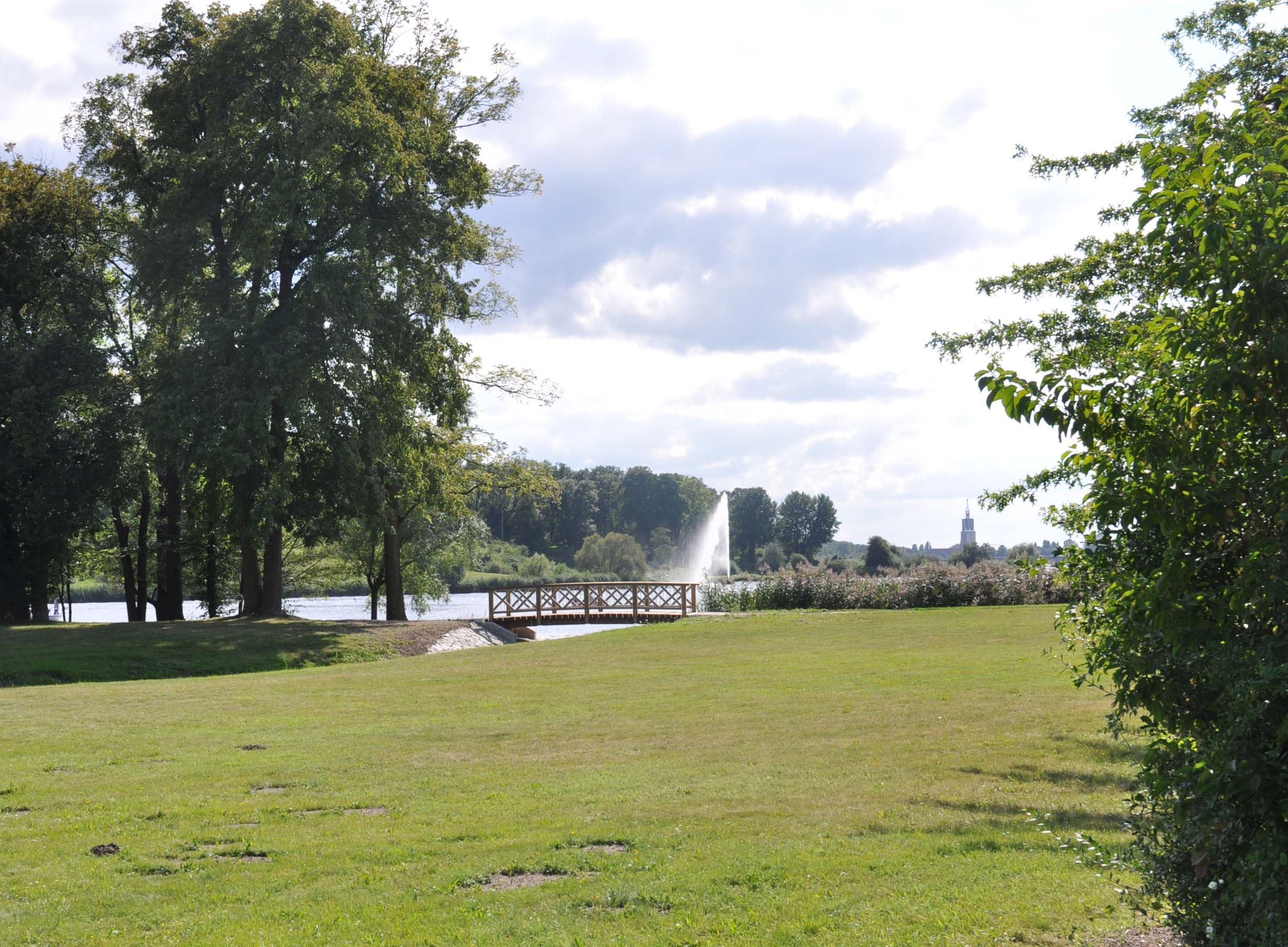 Jagdschlossgarten Klein-Glienicke, Blick auf die Fontäne in der Glienicker Lake